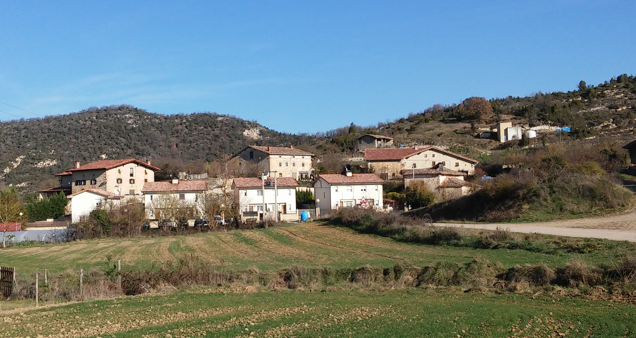 Moskator herria (Trebiñu)